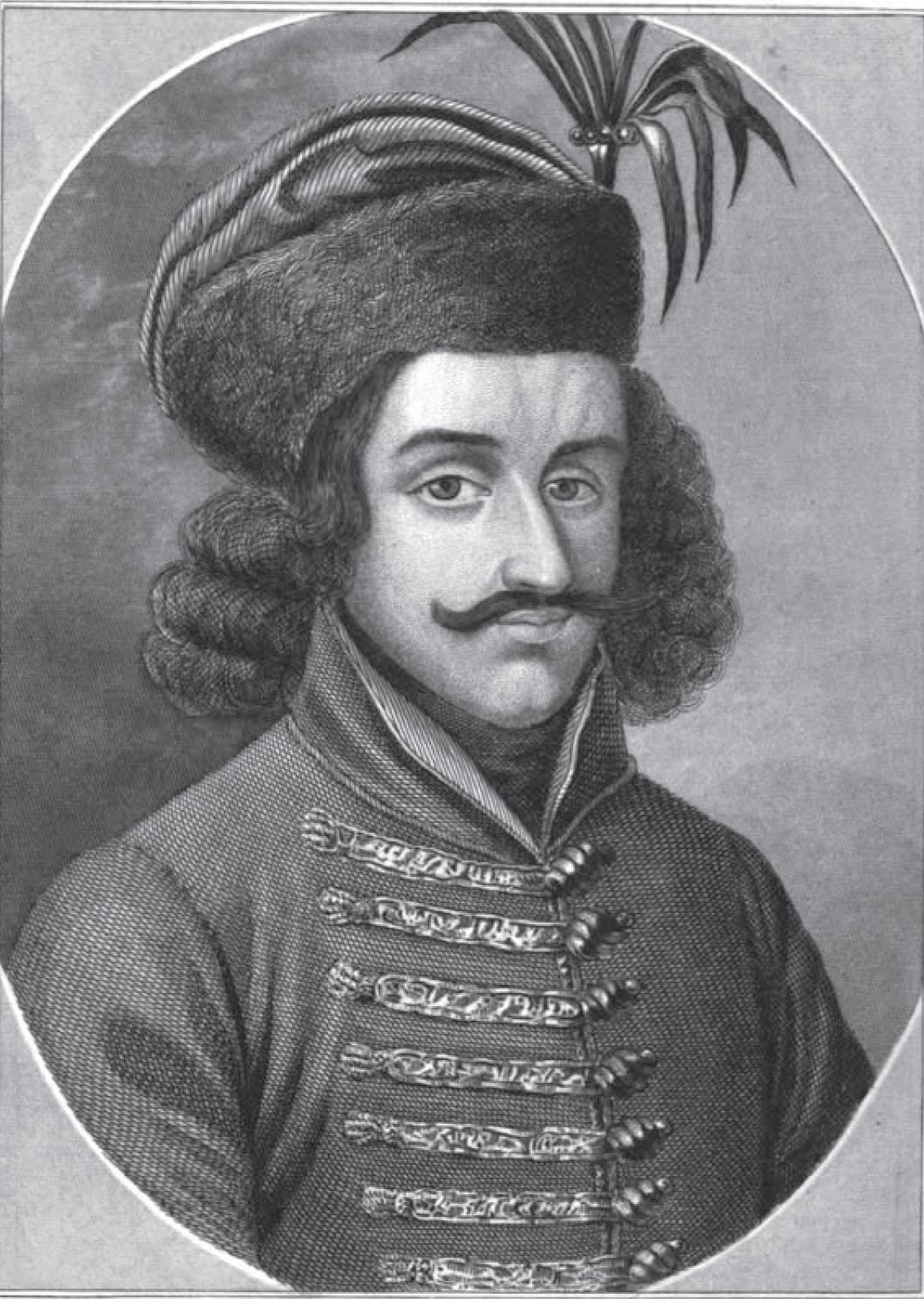 Szilágyi Mihály acélmetszetű arcképe Teleki József gróf „A Hunyadiak kora” c. könyvének III. kötetéből (Emich Gusztáv Könyvnyomdája, Pest, 1880)